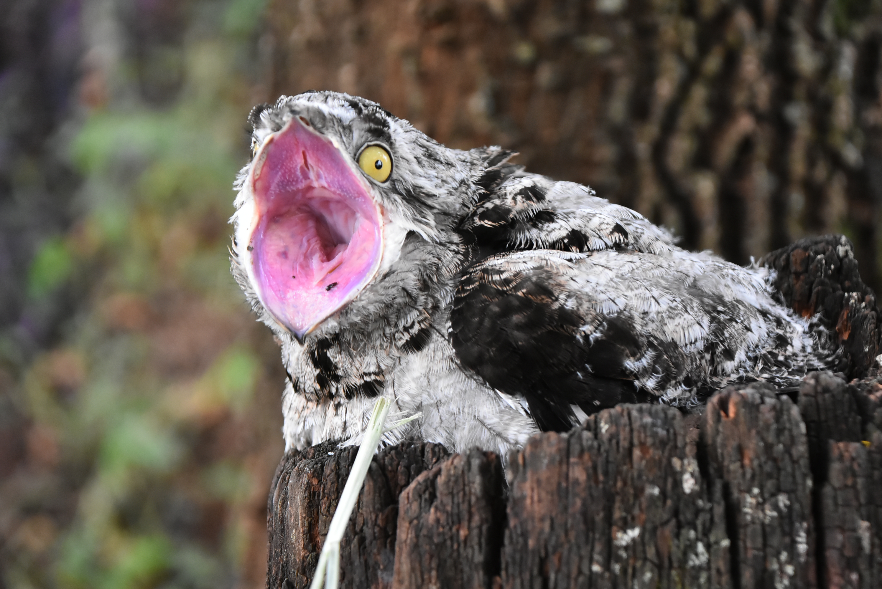 Filhote de urutau descansando, aninhado em concavidade de árvore cortada.